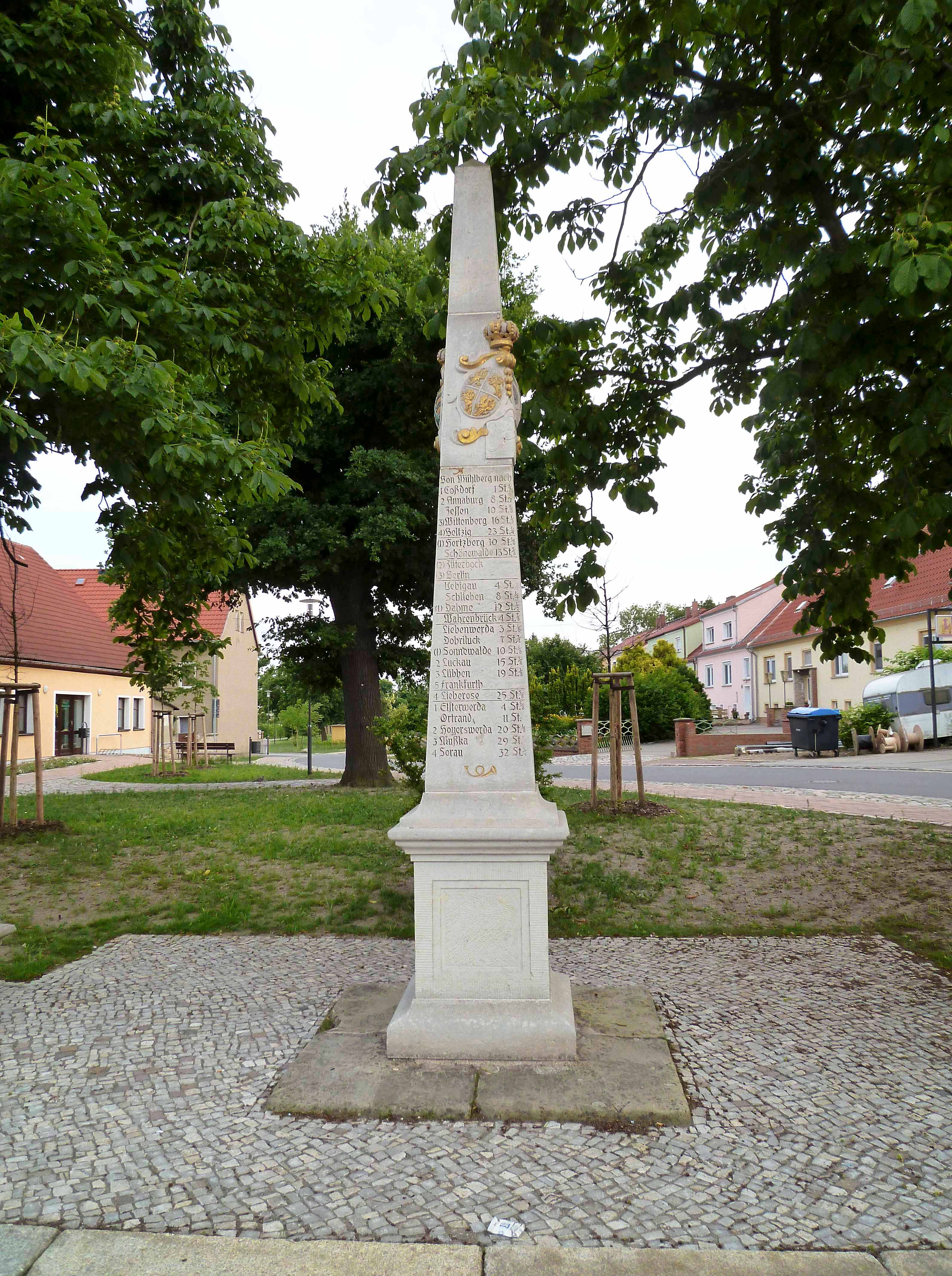 Kursächsische Postmeilensäule-Distanzsäule in Mühlberg